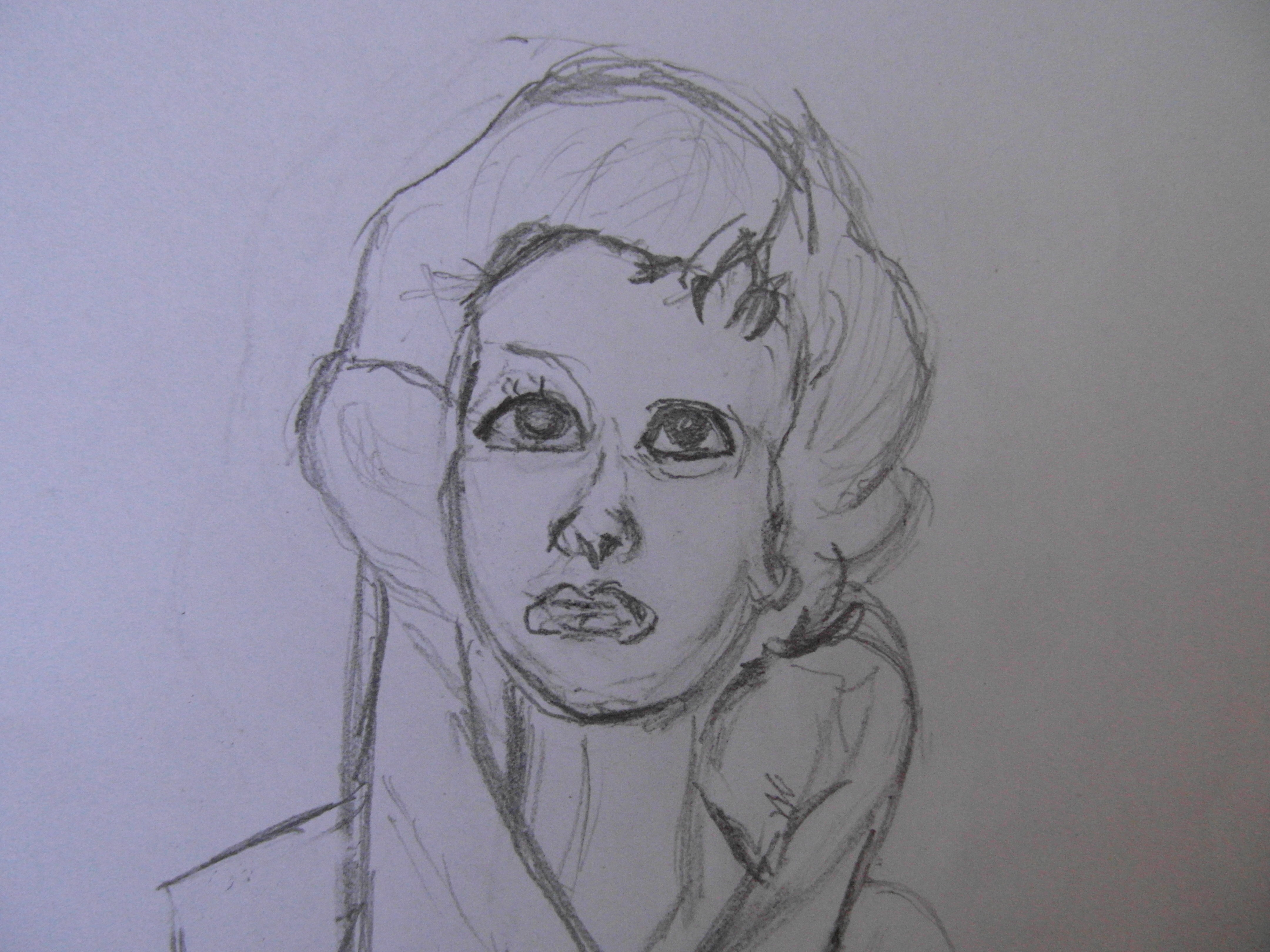 Édith Scob dans les yeux sans visage